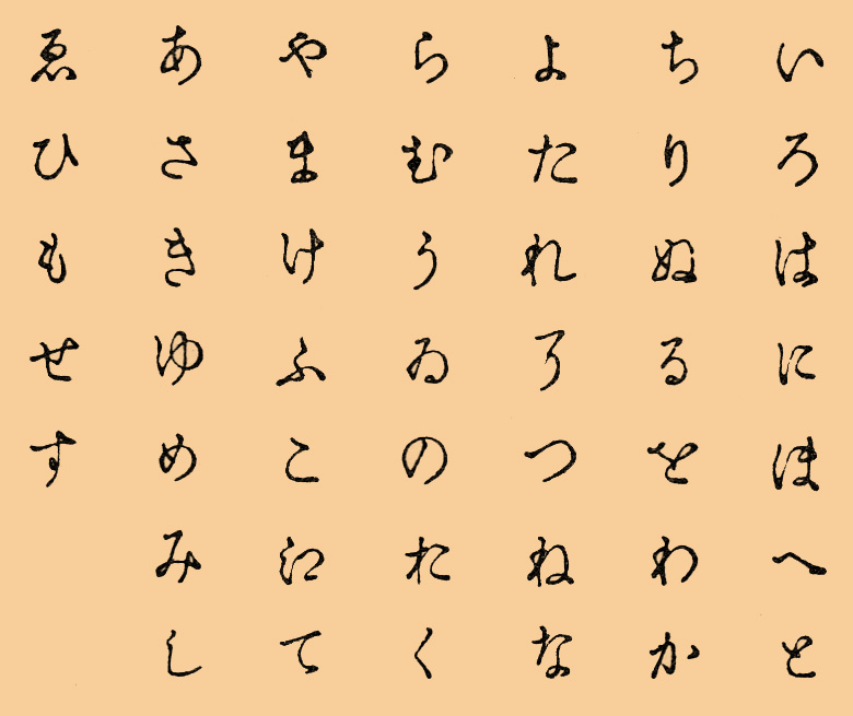 Иллюстрация к статье Япония из энциклопедии Брокгауза и Ефрона